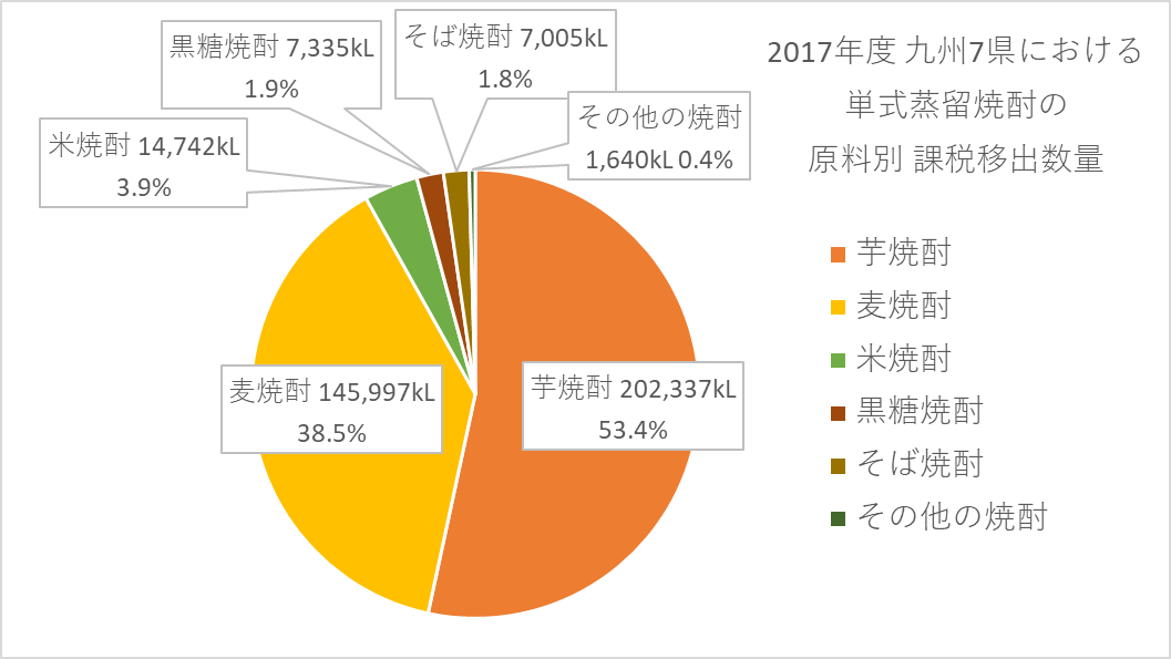 国税庁 単式蒸留焼酎製造業の概況（平成29年度調査分） を基に作成